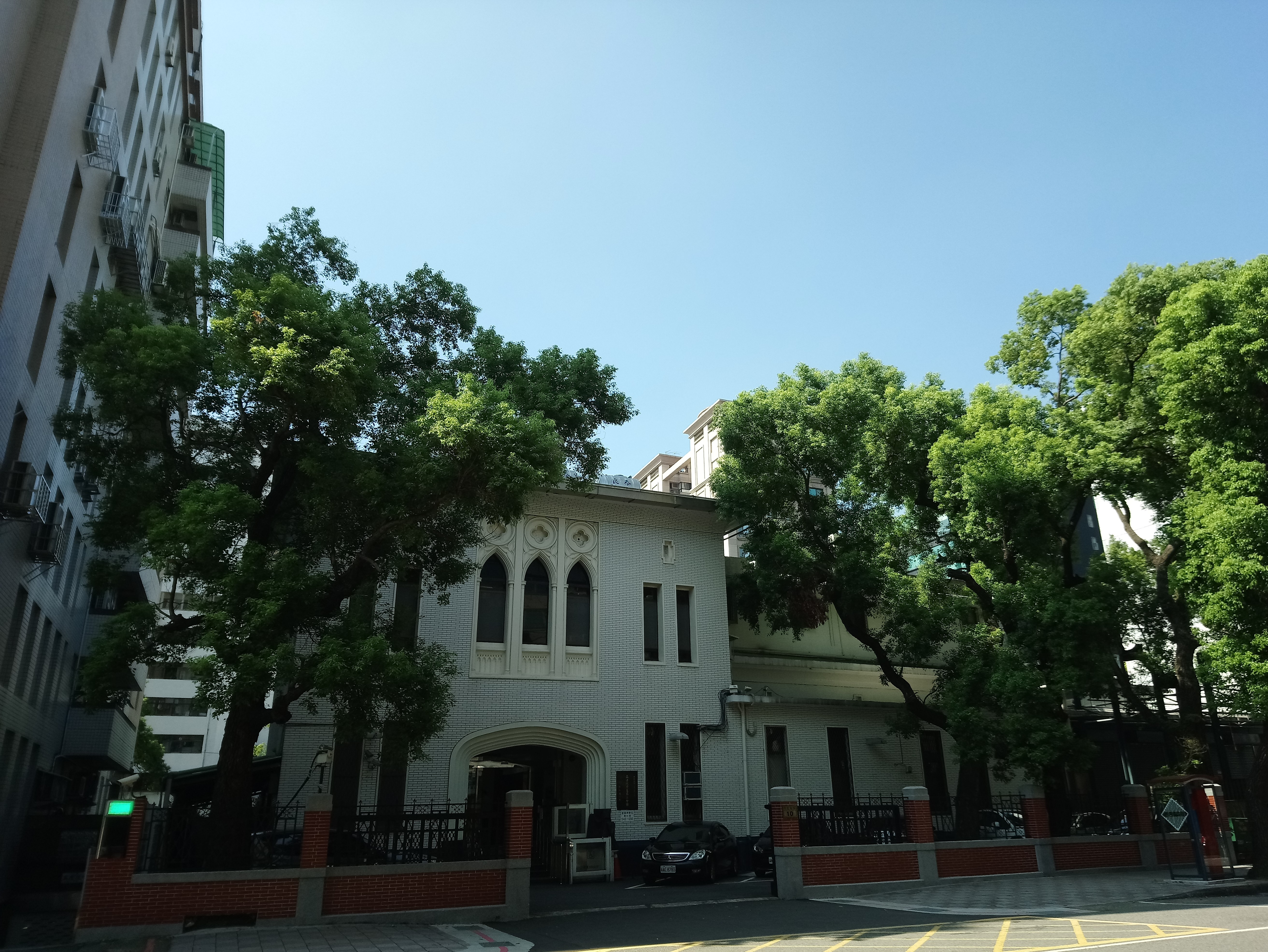 立法院青島第二會館(原七星郡役所),臺北市中正區東門次分區幸福里